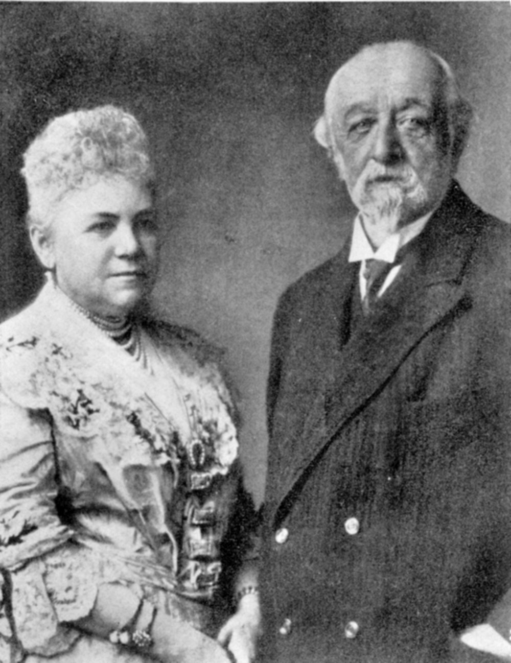 Hans Ulrich von Schaffgotsch und seine Ehefrau Johanna (geb.Grycik) in der Festschrift der Schaffgotschen Werke von 1908